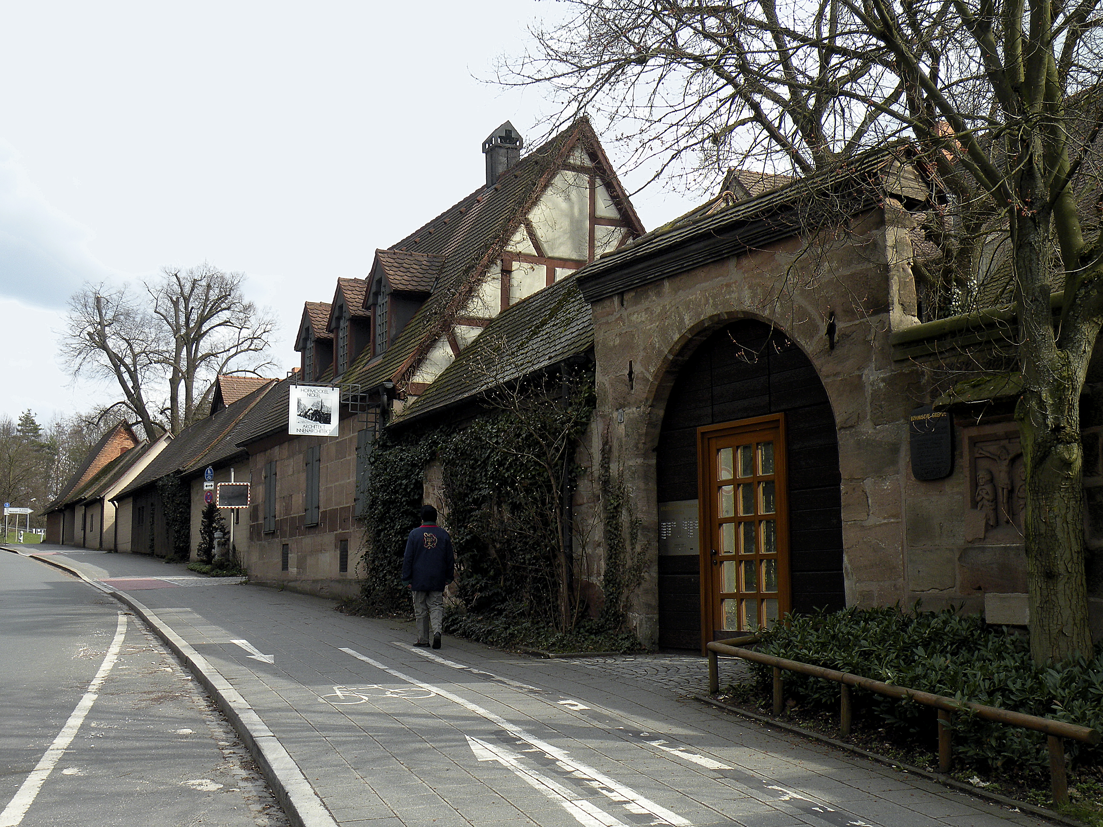 Комплекс зданий пограничной заставы с Богемией. Нюрнберг